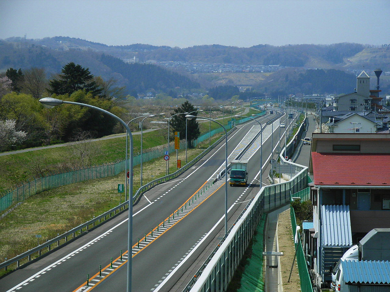 Sendai Nanbu Road. Sendai, Miyagi prefecture, Japan.